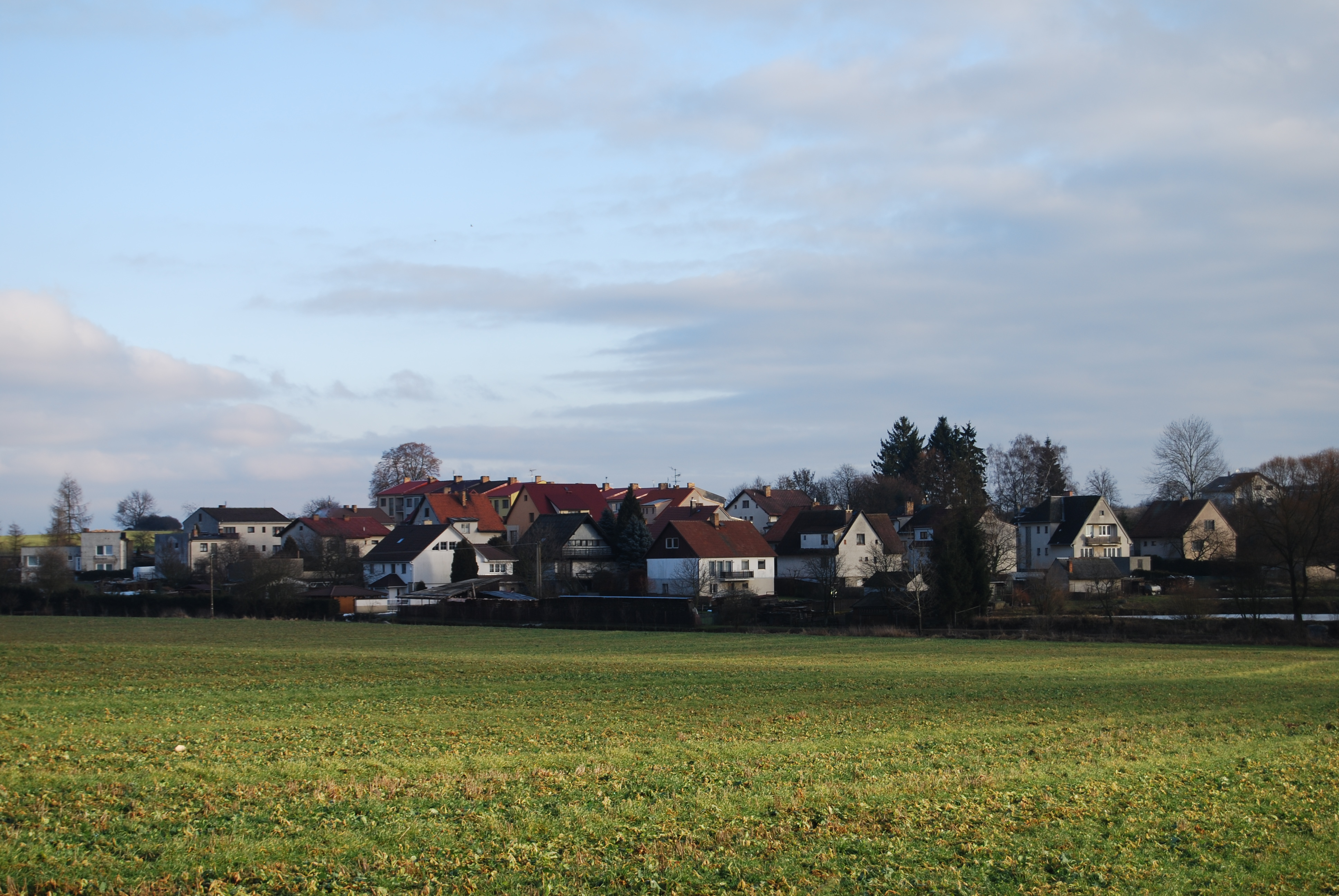 Pohled na část obce od kříže v polích u rybníka Zlatina. Zbelítov. Okres Písek. Česká republika.